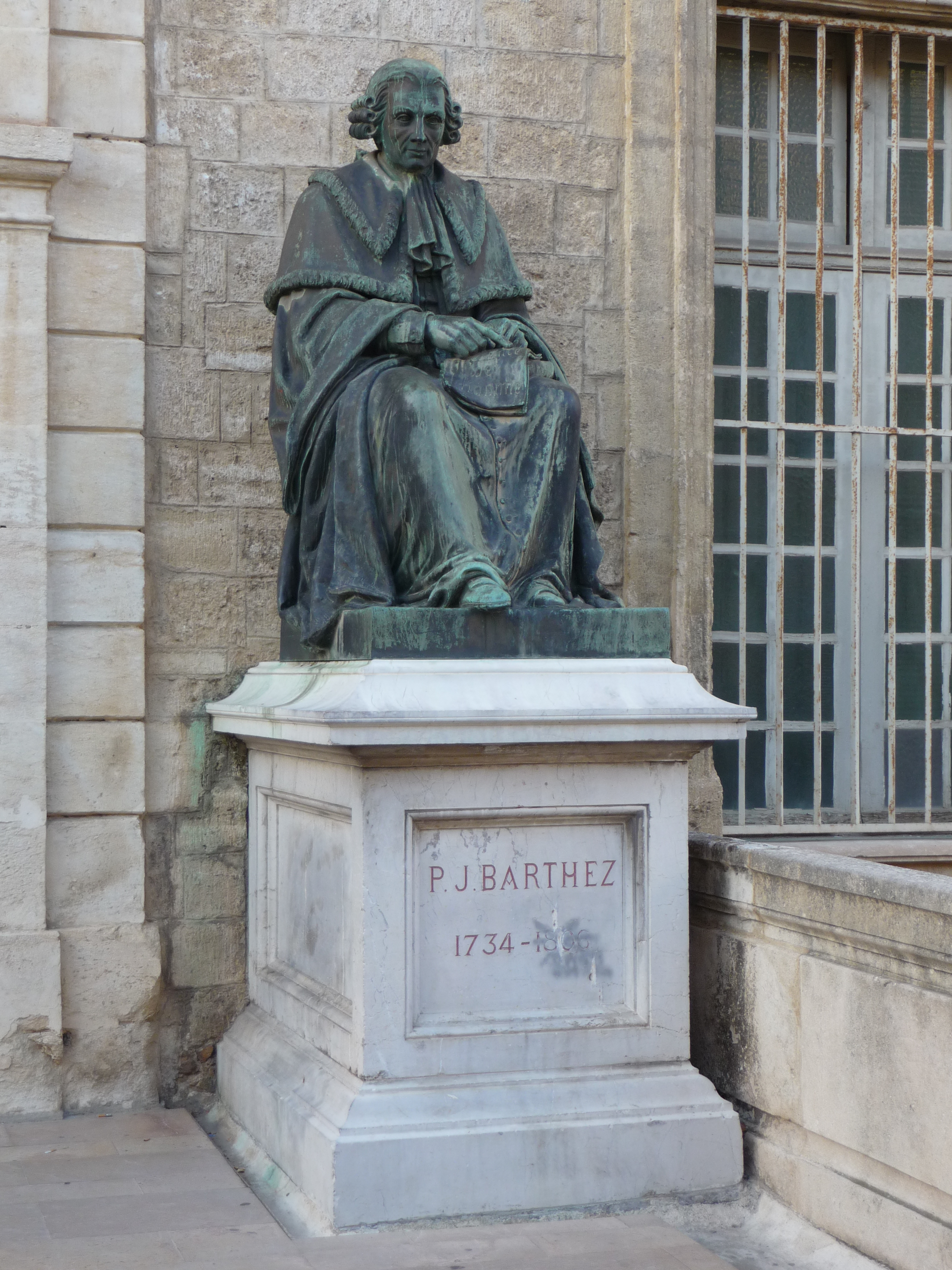 Facultat de Medicina (Montpeller) .